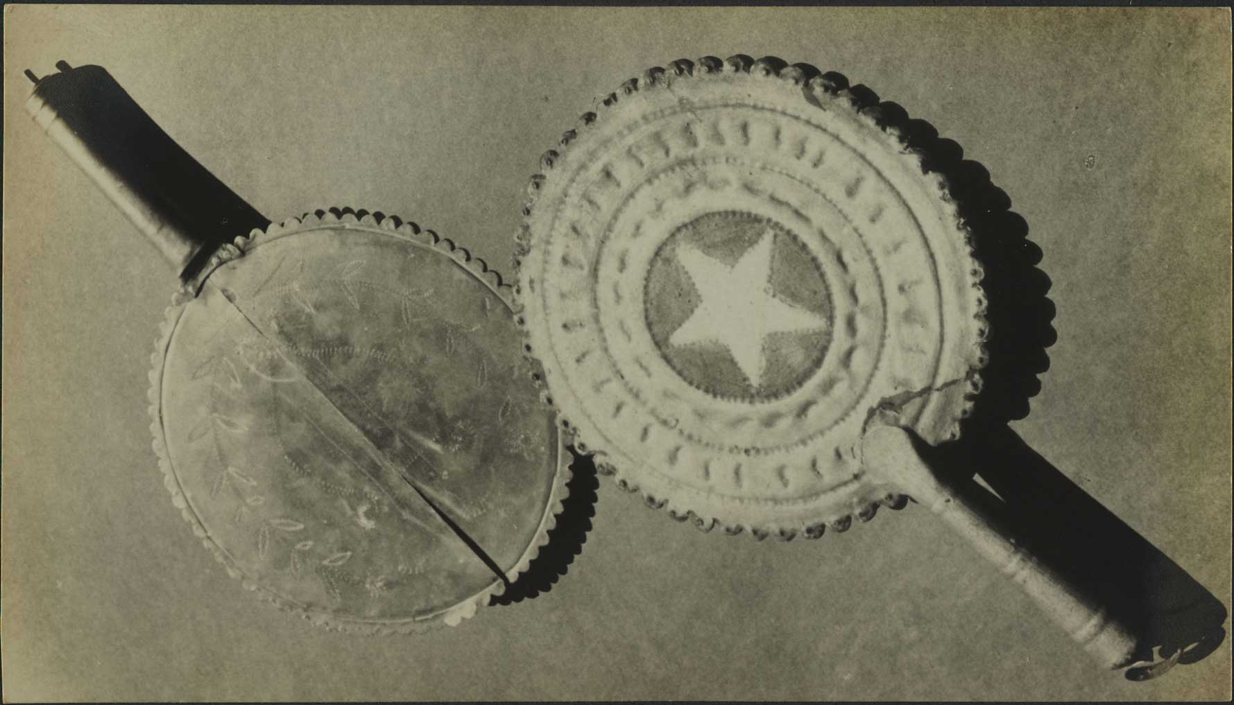 Título [Fotos dos trabalhos apresentados pelo prof. Arthur Ramos. O conjunto é intitulado "A arte negra do Brasil: ilustrações da obra"]. [Iconográfico] Imprenta [S.l.: s.n.], [s.d].